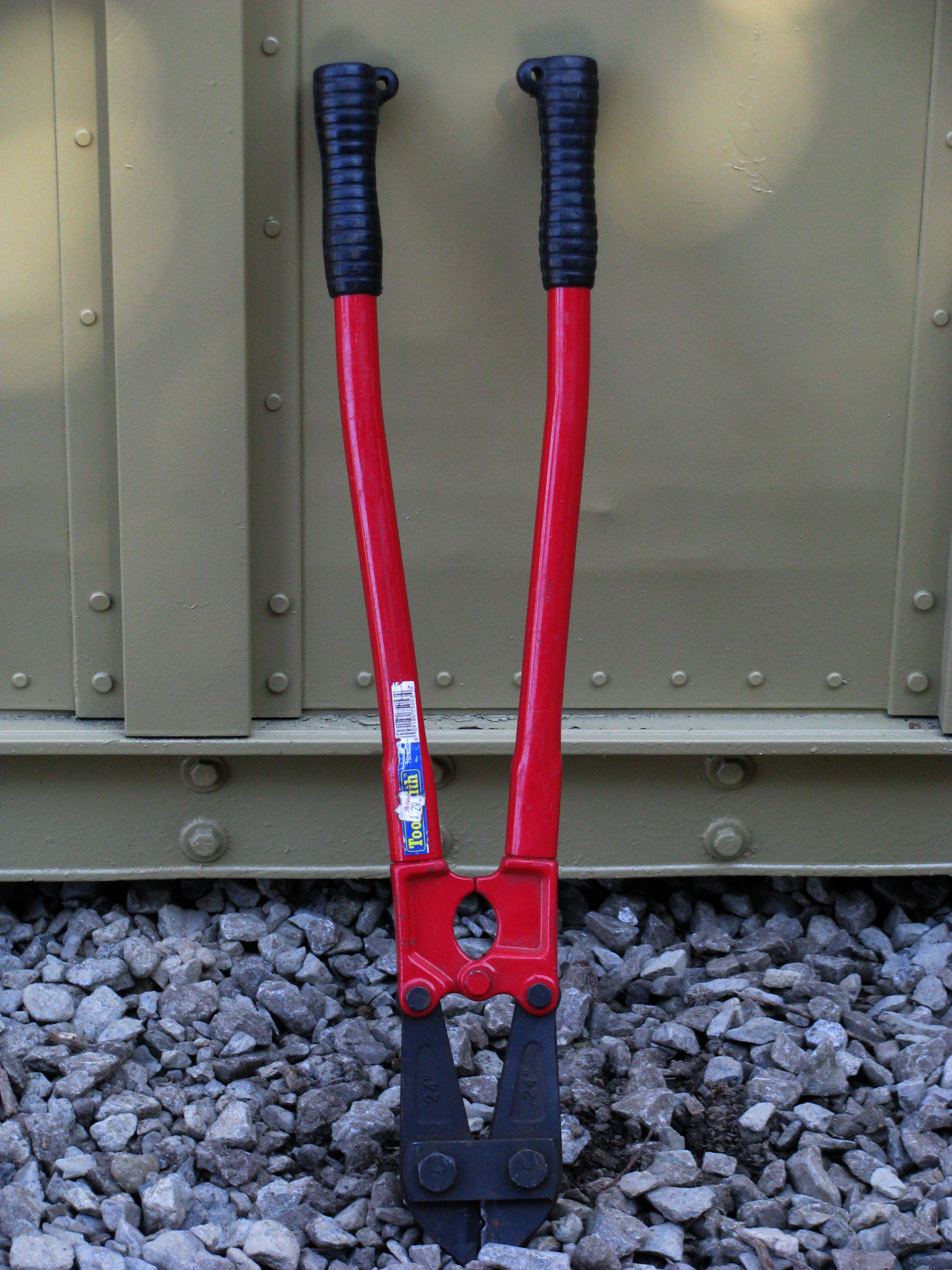 Bolt Cutter